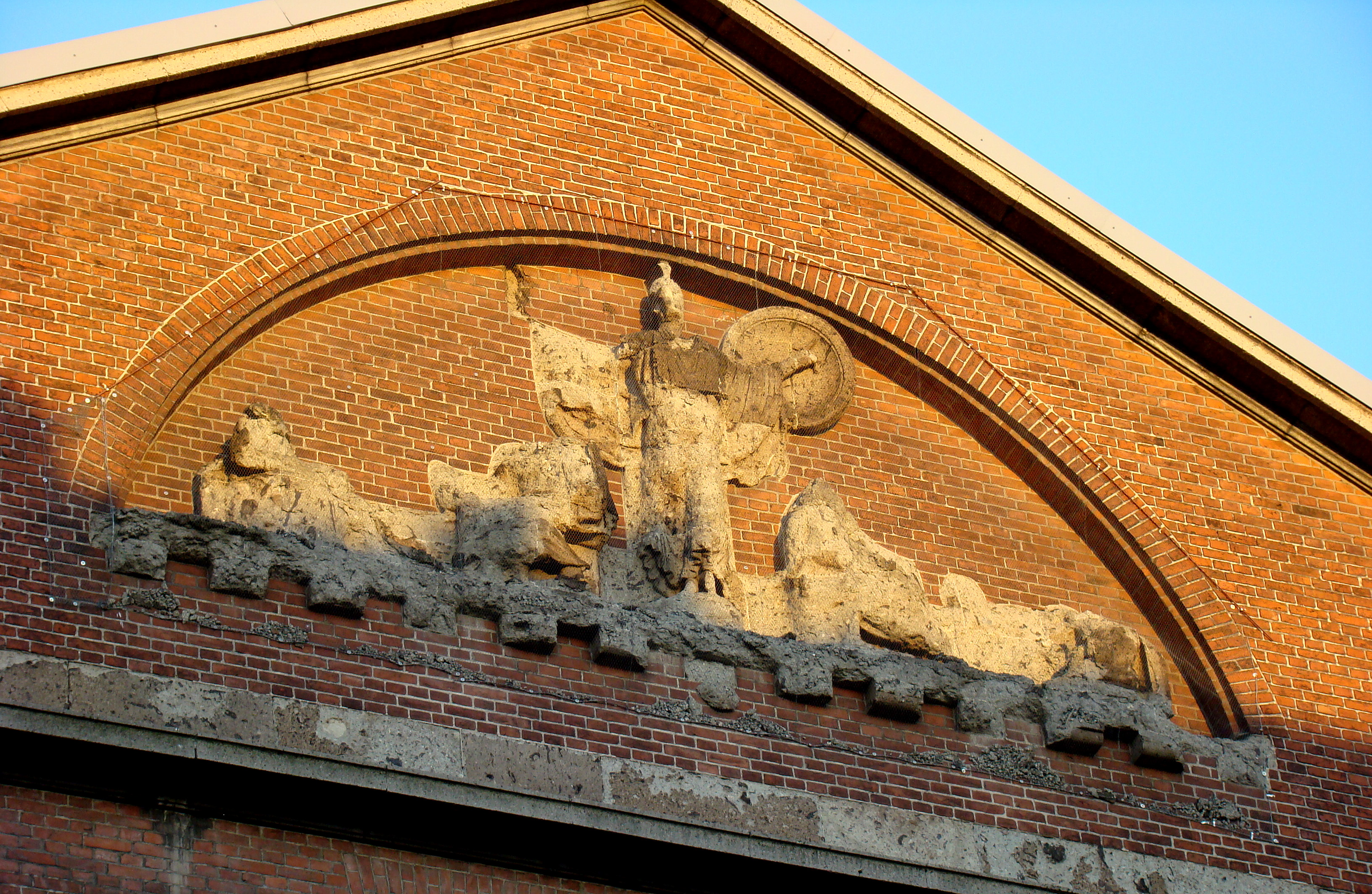 Gimnazjum Mariackie w Szczecinie, Polska